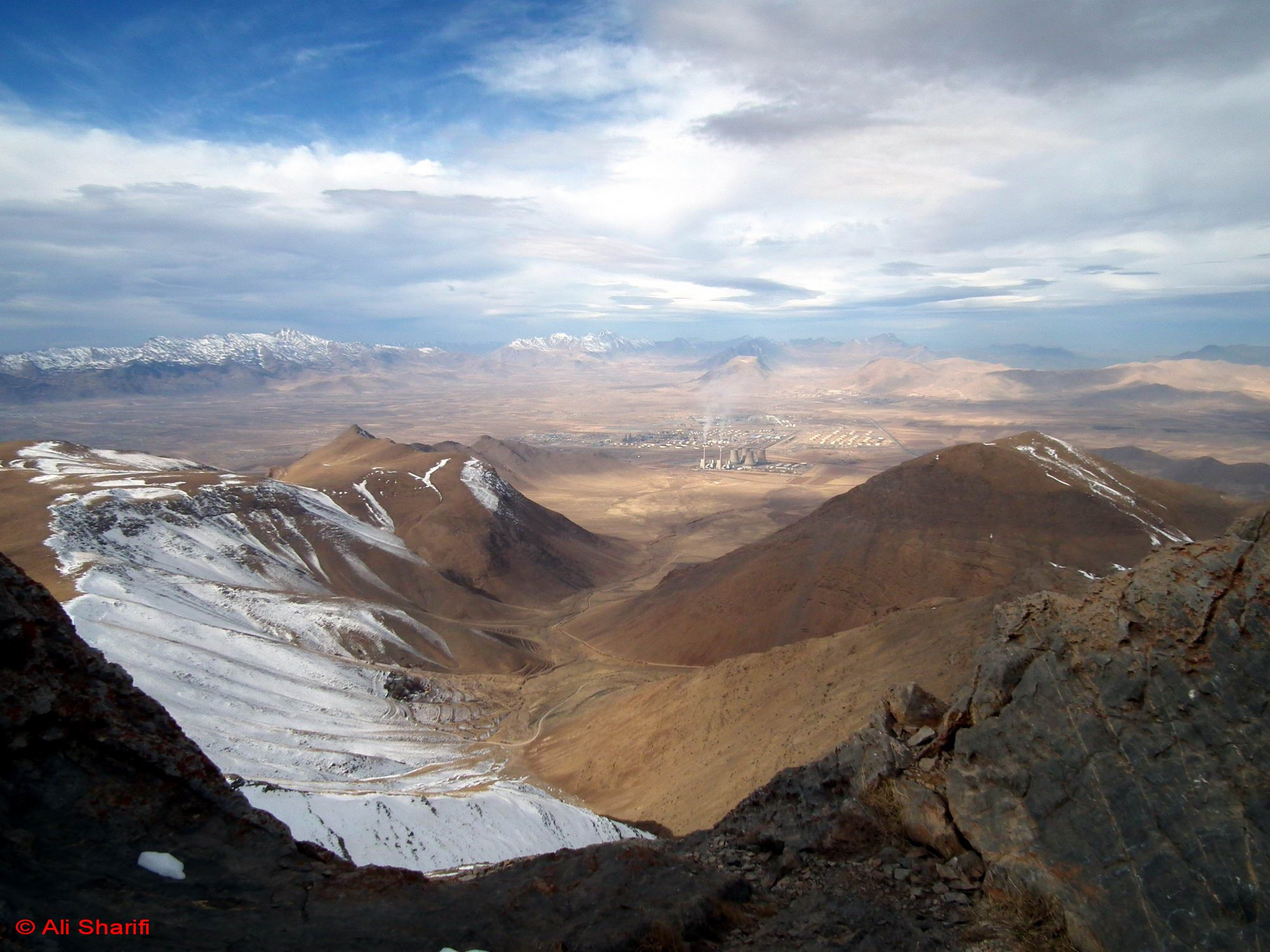 نمایی از فراز یال سفید خانی - چپقلی و نیروگاه